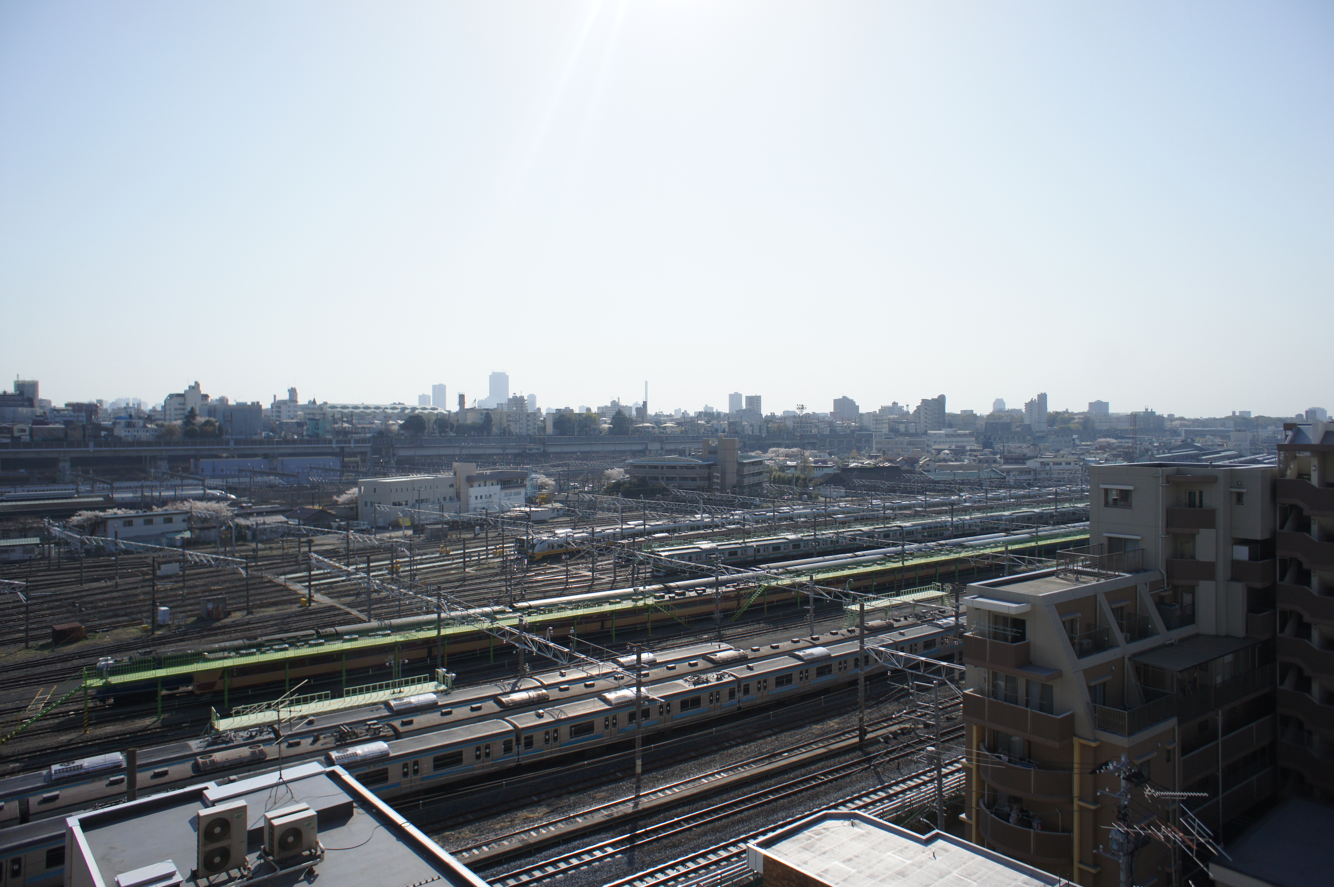 尾久車両センター